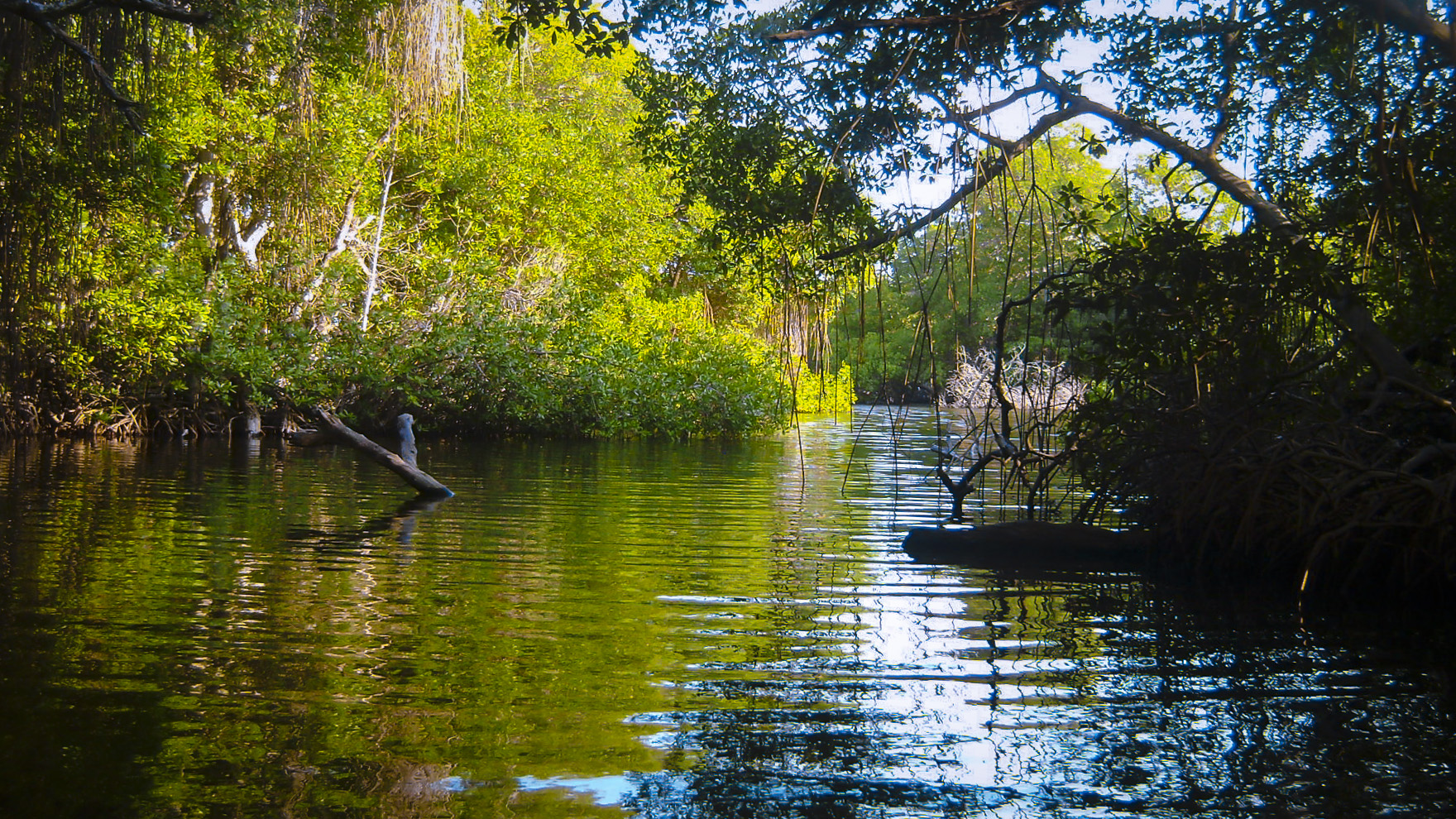 Manglares del Parque Nacional Morrocoy